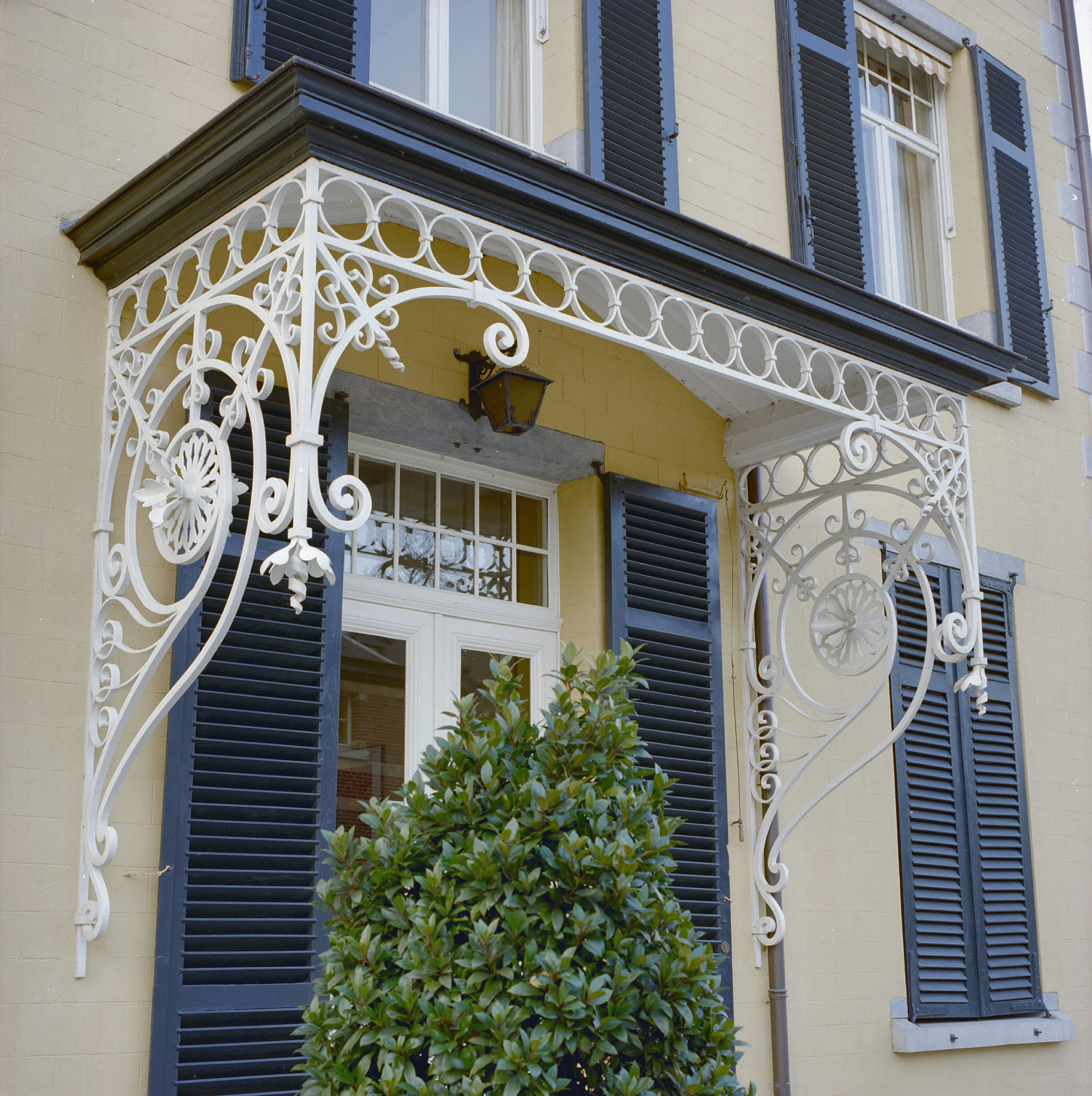 Huis Kruisdonk: Exterieur DEURPARTIJ, DETAIL